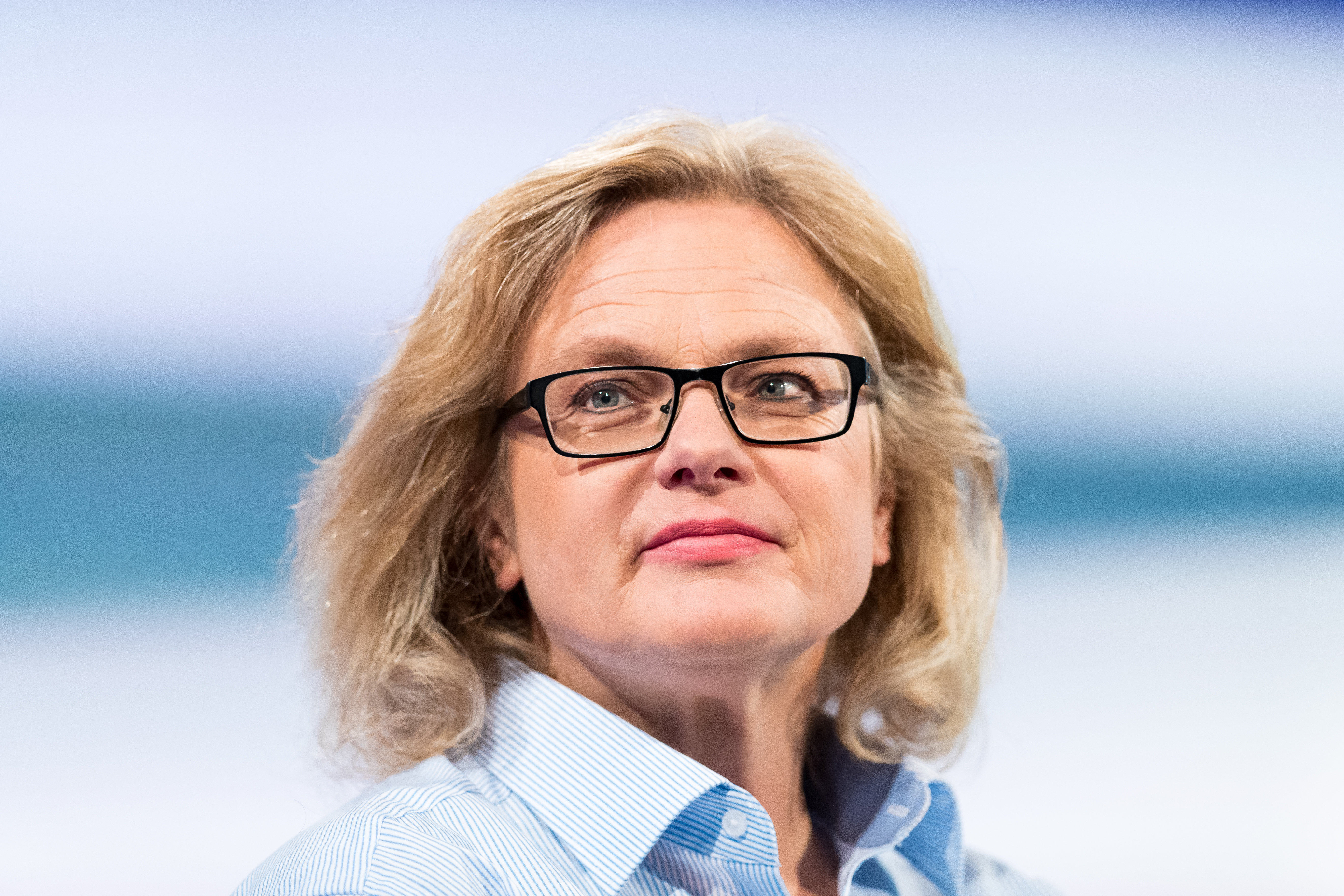 Karen Duve during Frankfurter Buchmesse at Messe Frankfurt, Frankfurt, Hessen, Germany on 2018-10-13, Photo